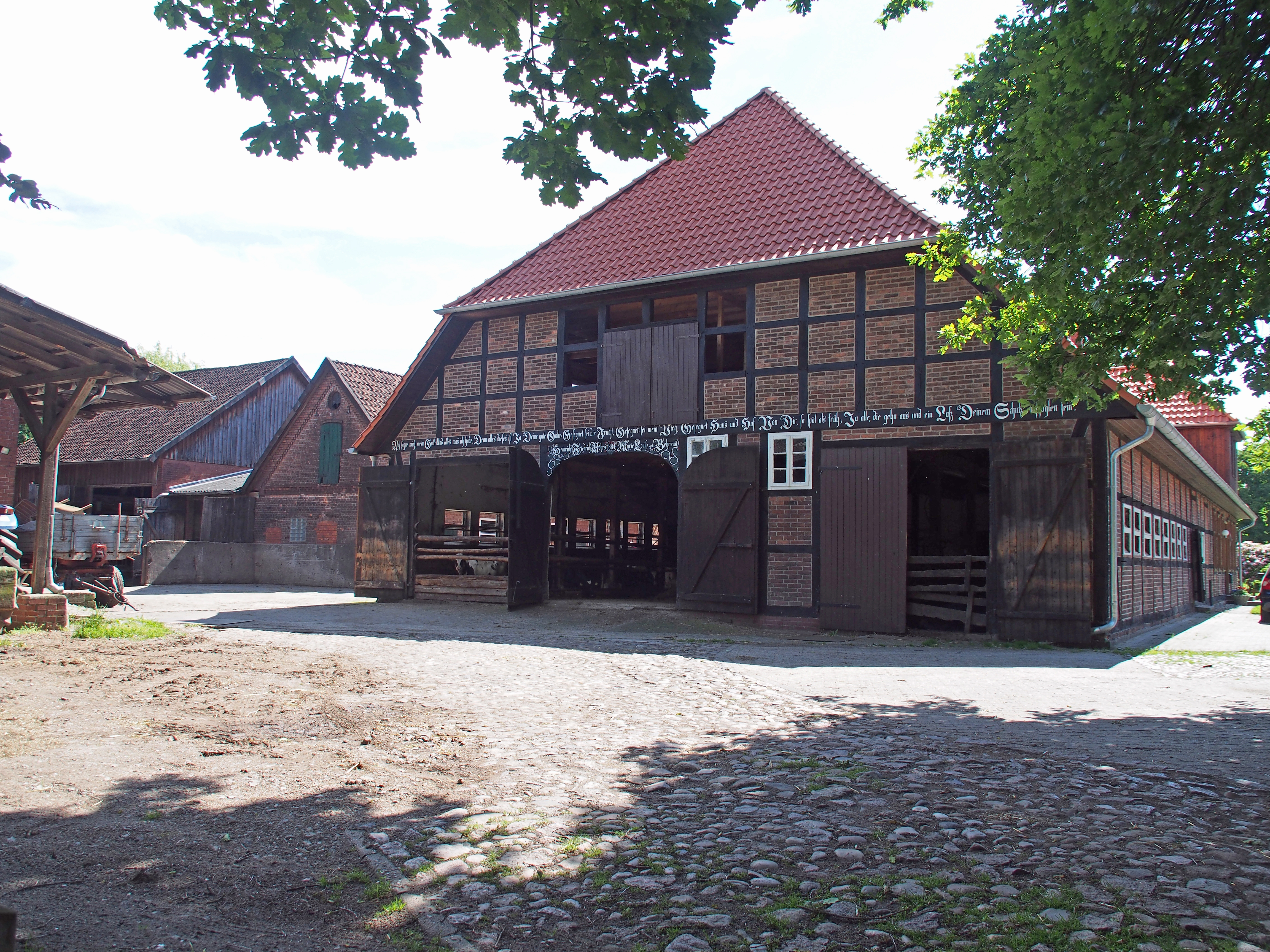 Bauernhaus (Haupthaus von 1884) in Eversen, Stadt Bergen (Niedersachsen)